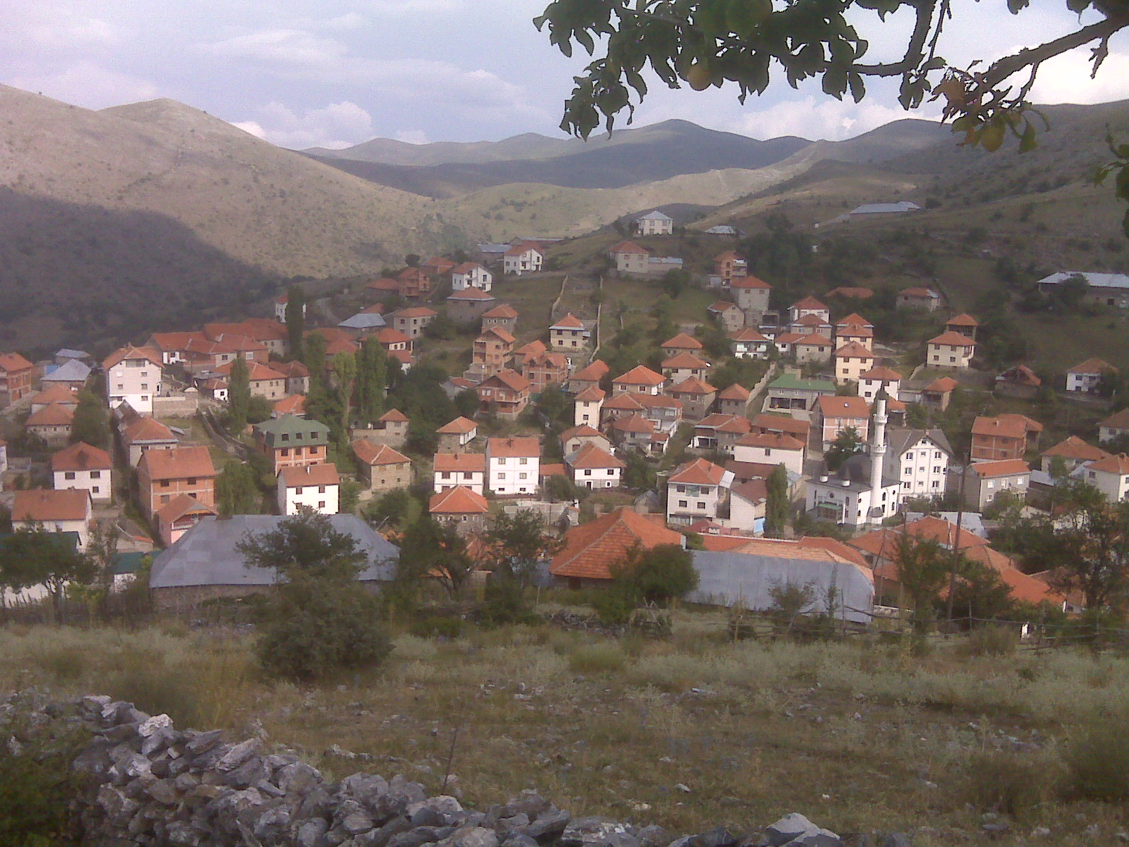 Fshati Korite